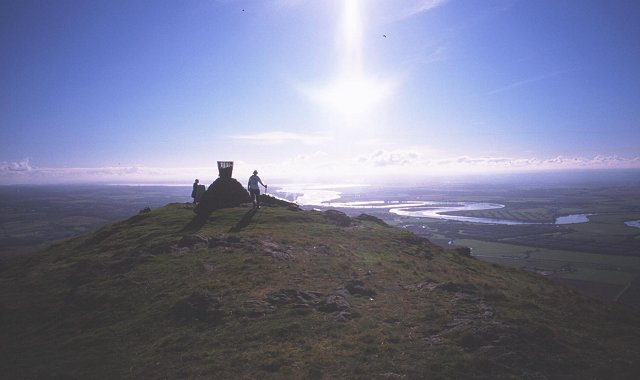 Dumyat